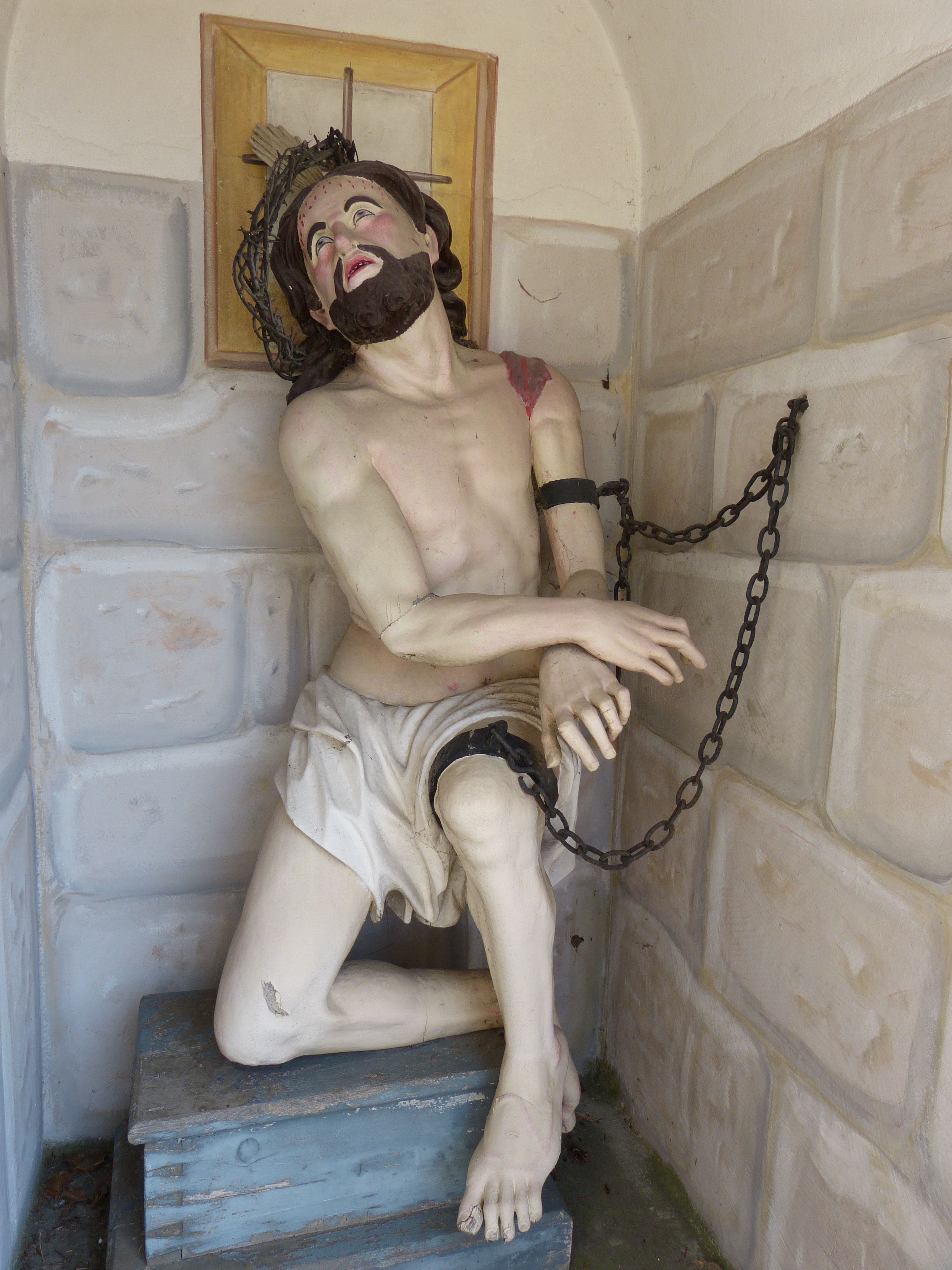 Geißelheiland in Amberg, Landkreis Unterallgäu, BayernThis is a photograph of an architectural monument.